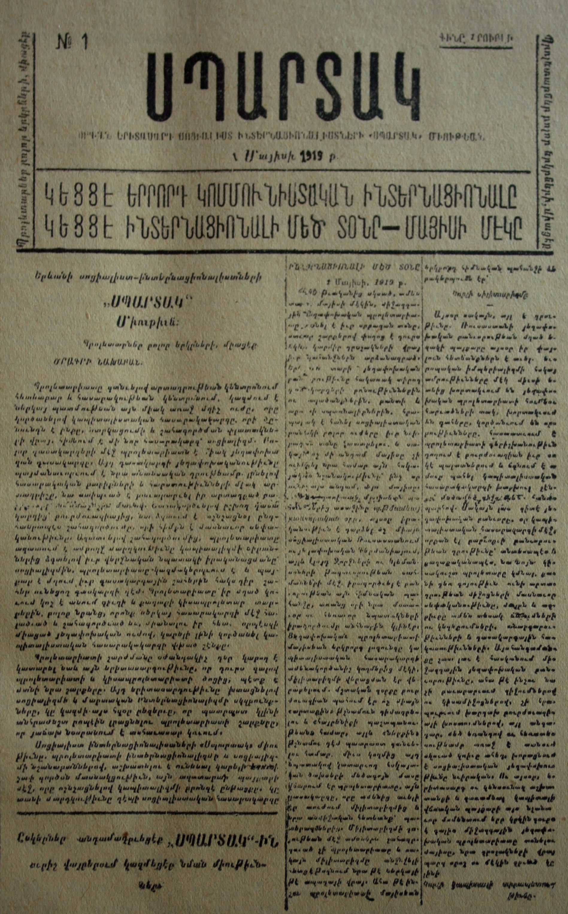 Սպարտակ երիտասարդական կազմակերպության օրգան թերթի շապիկը, վերատպված է՝ Ավանգարգ № 17, 1925